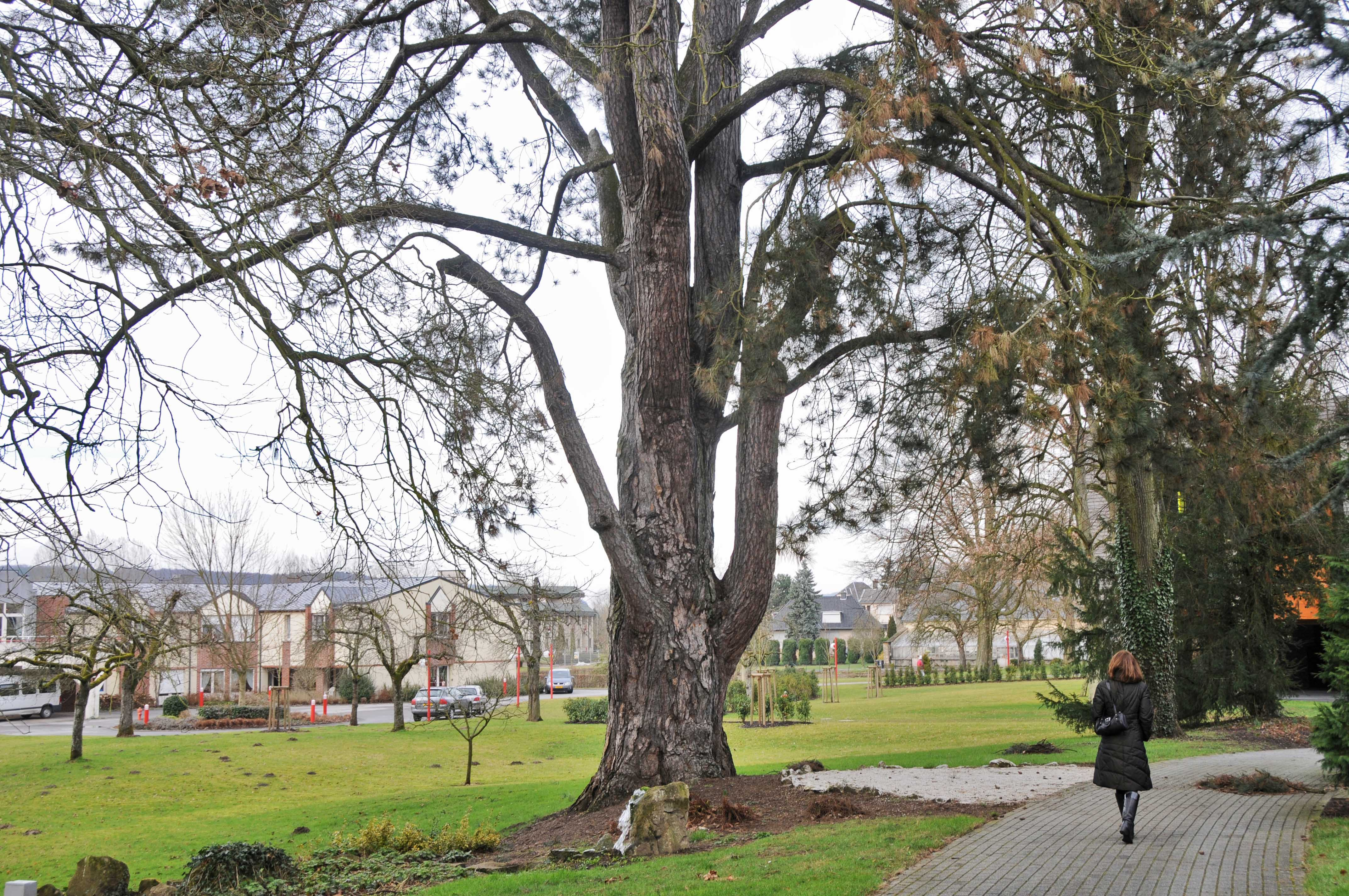 Heeschdrefer Park. Tricentenaire.